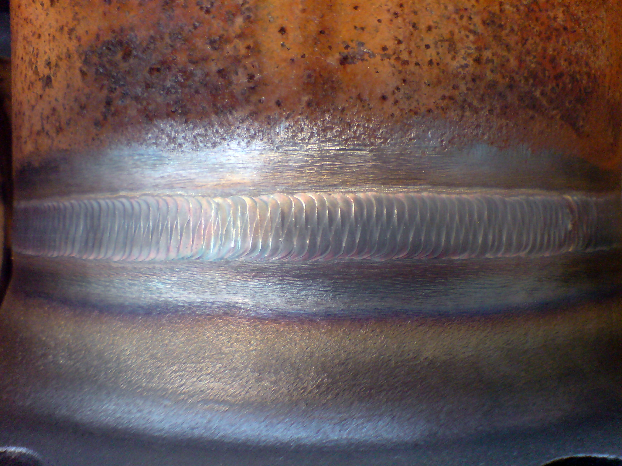 tig svets i svart material